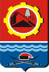 Герб города Донецка Ростовской Области